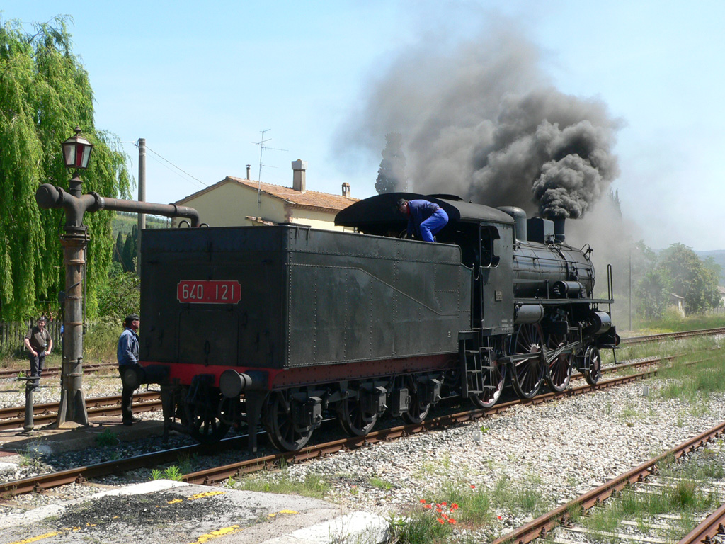 Treno a vapore si rifornisce di acqua alla Stazione di Monte Antico